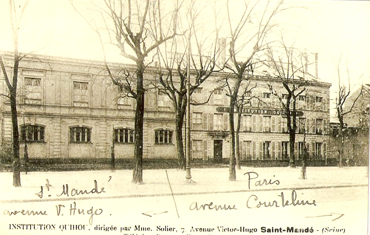 Cette photo montre l'institution Quihou qui était auparavant le pensionnat des Chanoinesses de Saint Augustin qui a accueillit Juliette Drouet la maîtresse de Victor Hugo lui a servi de référence livresque dans les Misérables. Elle a été prise avant l'annexion d'une partie de la commune de Saint-Mandé à la ville de Paris en 1921. La limite écrite à la main sur la carte postale ne me semble pas exacte car le bâtiment de gauche qui par la suite est devenu une imprimerie faisait bien parti de paris et du quartier Picpus ? De plus justement après le bâtiment de gauche il y a un panneaux qui marque l'entrée de Saint-Mandé et qu'on ne voit pas sur la photo. Sur ce cliché on voit bien les jardinets que Pierre Allard le maire de Saint-Mandé avait disposé devant les maisons pour agrémenter les promenades des personnes qui se rendaient au bois de ... Saint-Mandé.